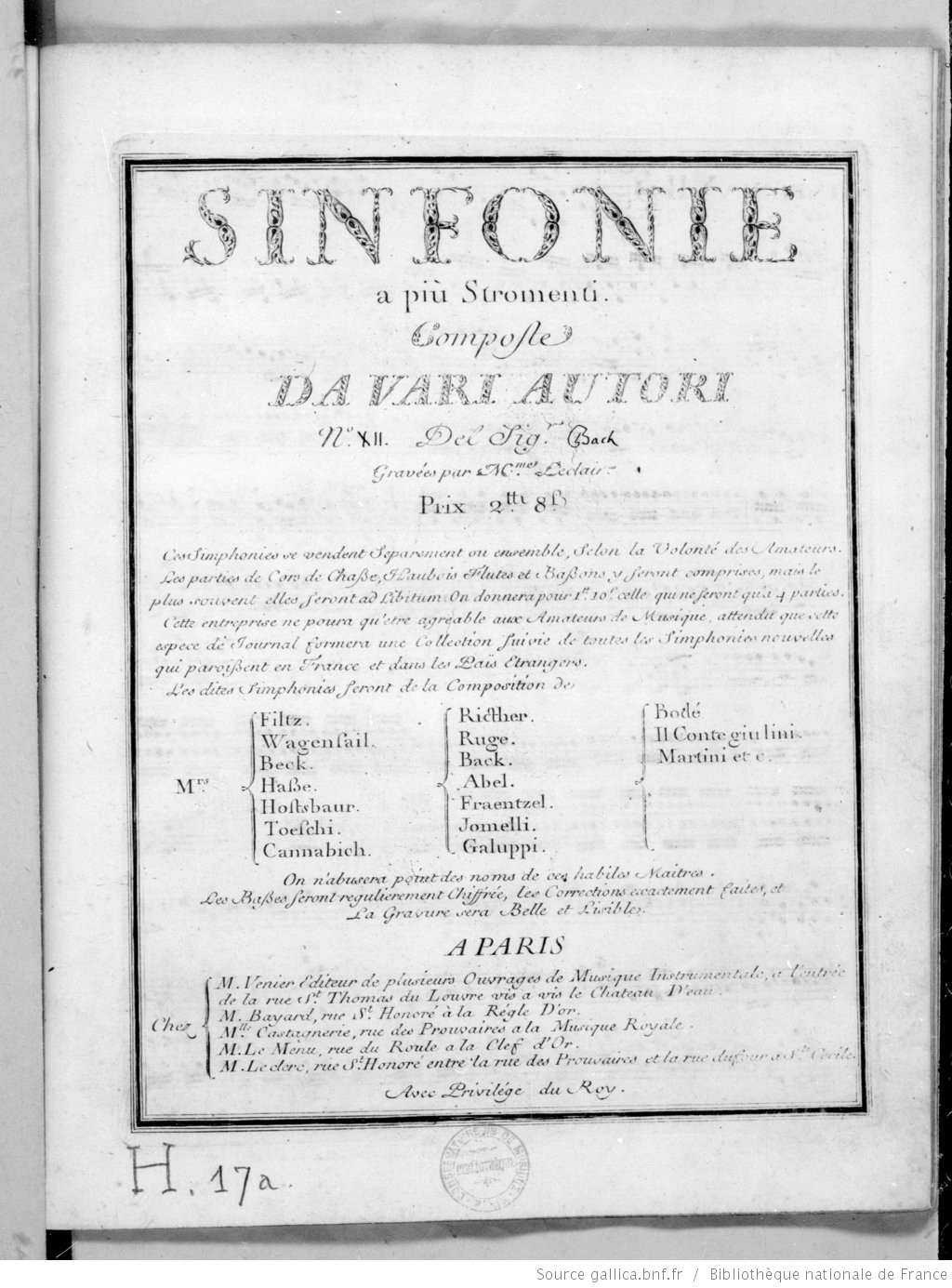 Page de titre d'une des publications de symphonies a più strumenti de l'éditeur Jean-Baptiste Venier : Johann Christian Bach en de 1762. On remarque que la page est commune à la série et que Bach est ajouté manuellement avec le numéro de la série ; ici XII.